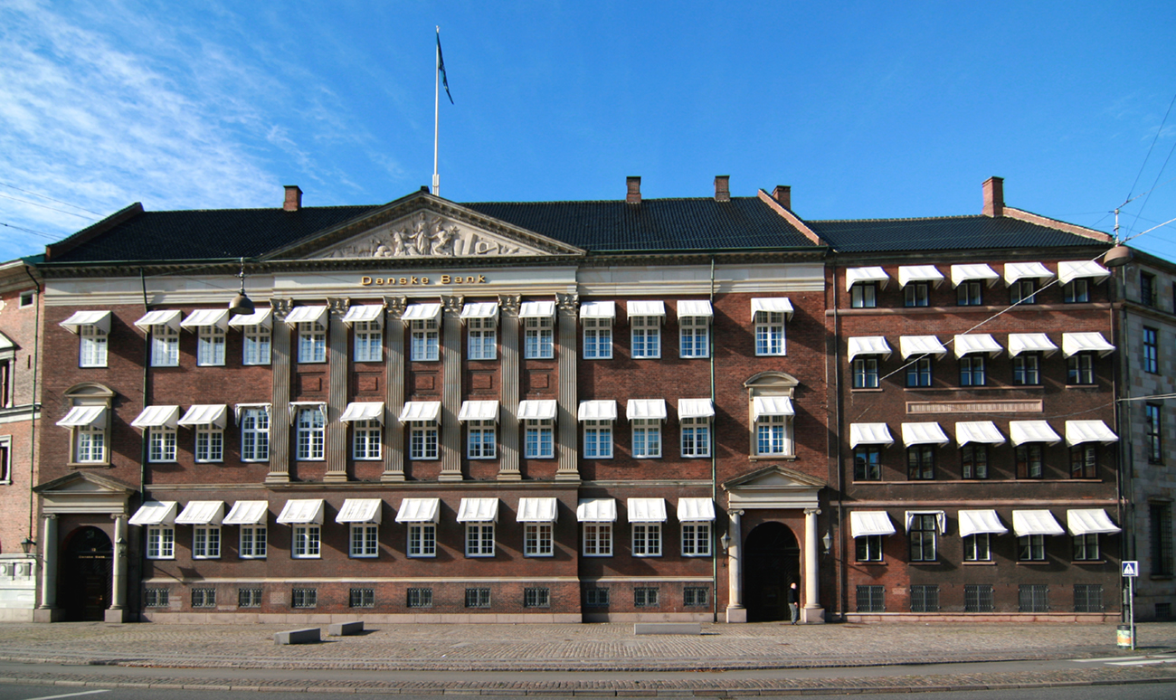 Danske Banks hovedsæde, Holmens Kanal 14, København. Bygget 1898. Fredet.